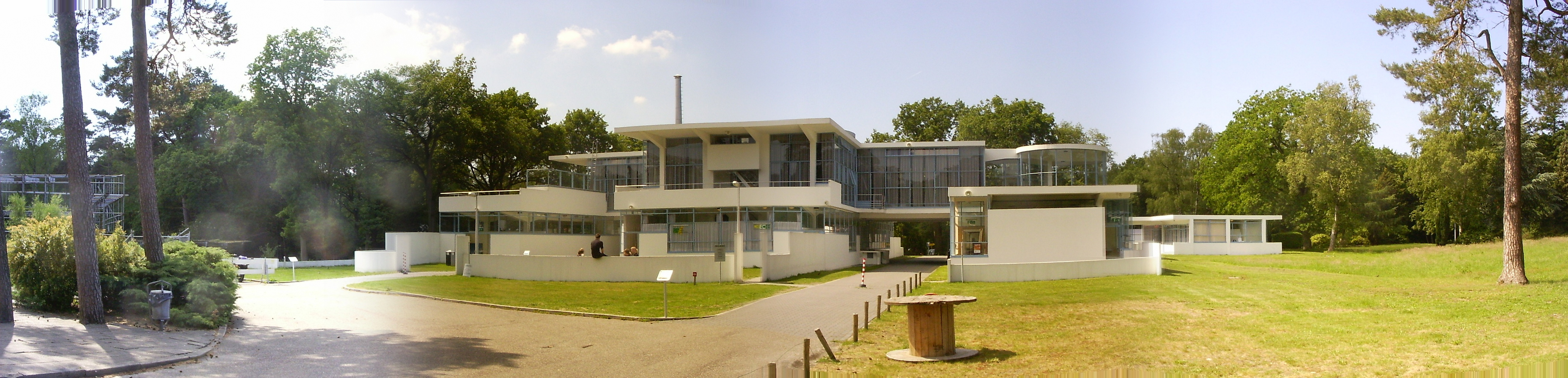 Hoofdgebouw Sanatorium Zonnestraal, voorkant